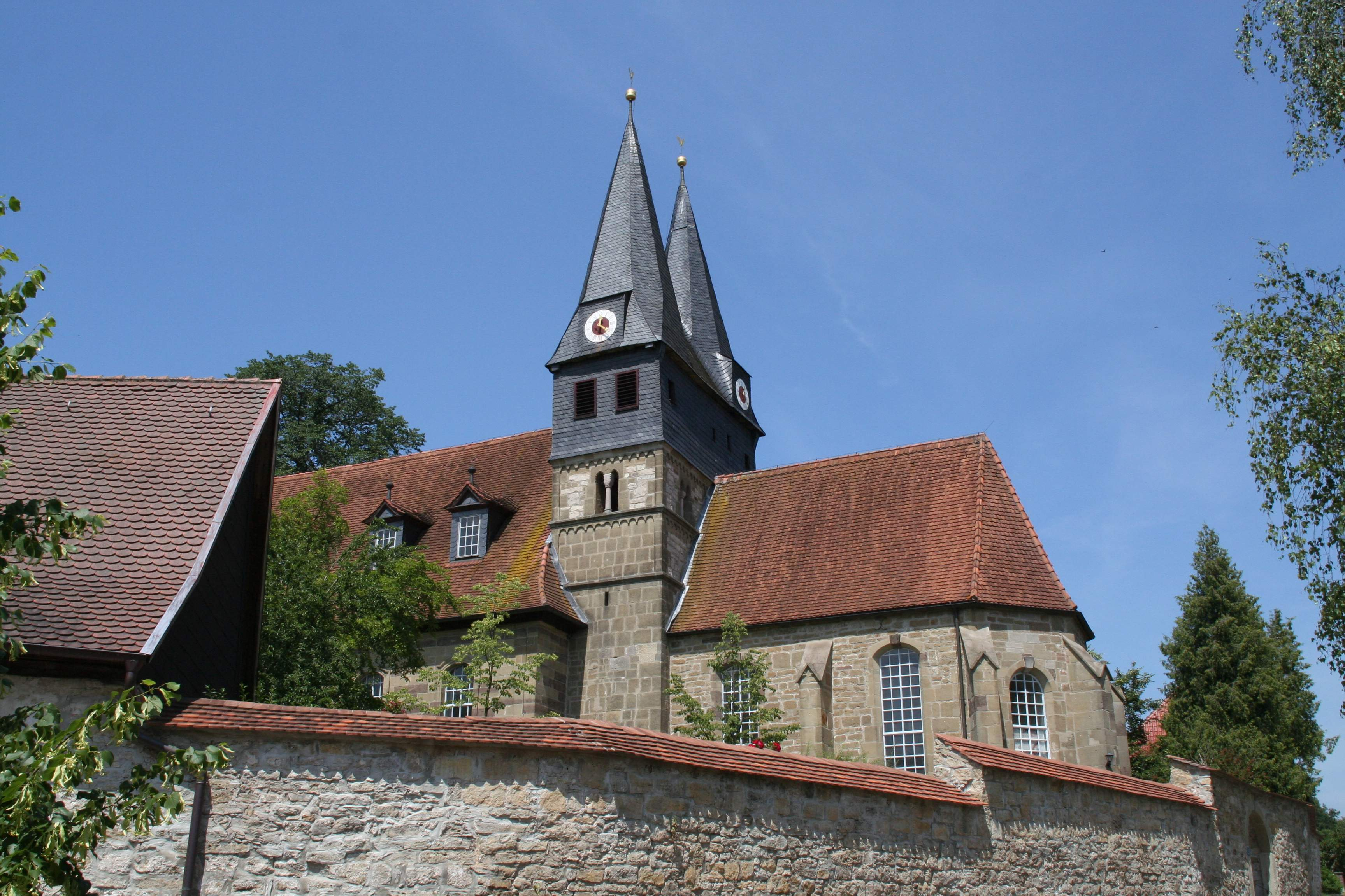 Kirche Meederevangelische St.-Laurentius-Kirche in Meeder Landkreis Coburg